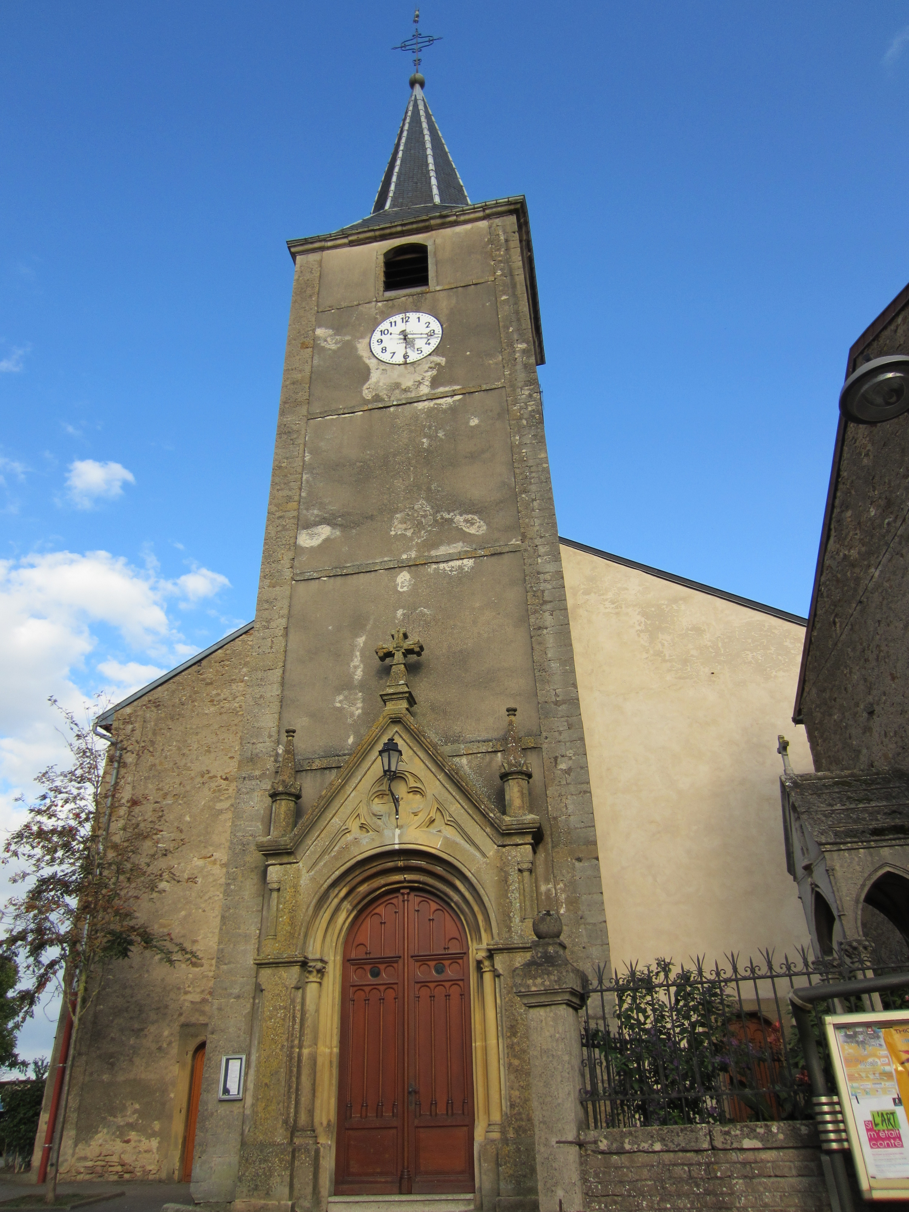 eglise Notre-Dame-de-la-Visitation à Oeutrange (voir [1])